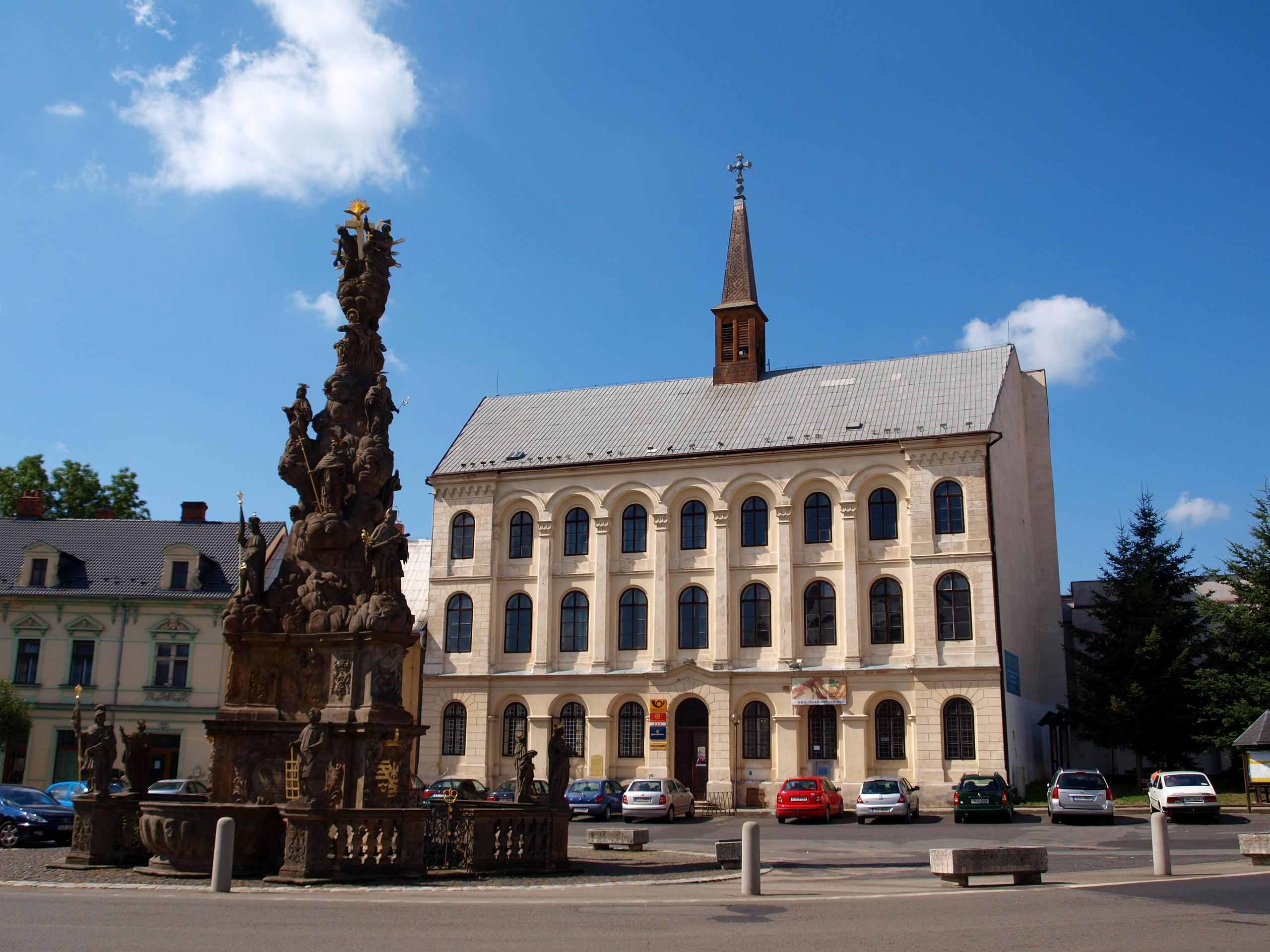 Zákupy - pošta